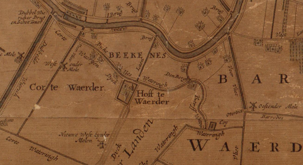 fragment van een kaart 'T Hooghe Heymraedtschap vanden Lande van Woerden door door Johannes, Justus en Davidt Vingboons